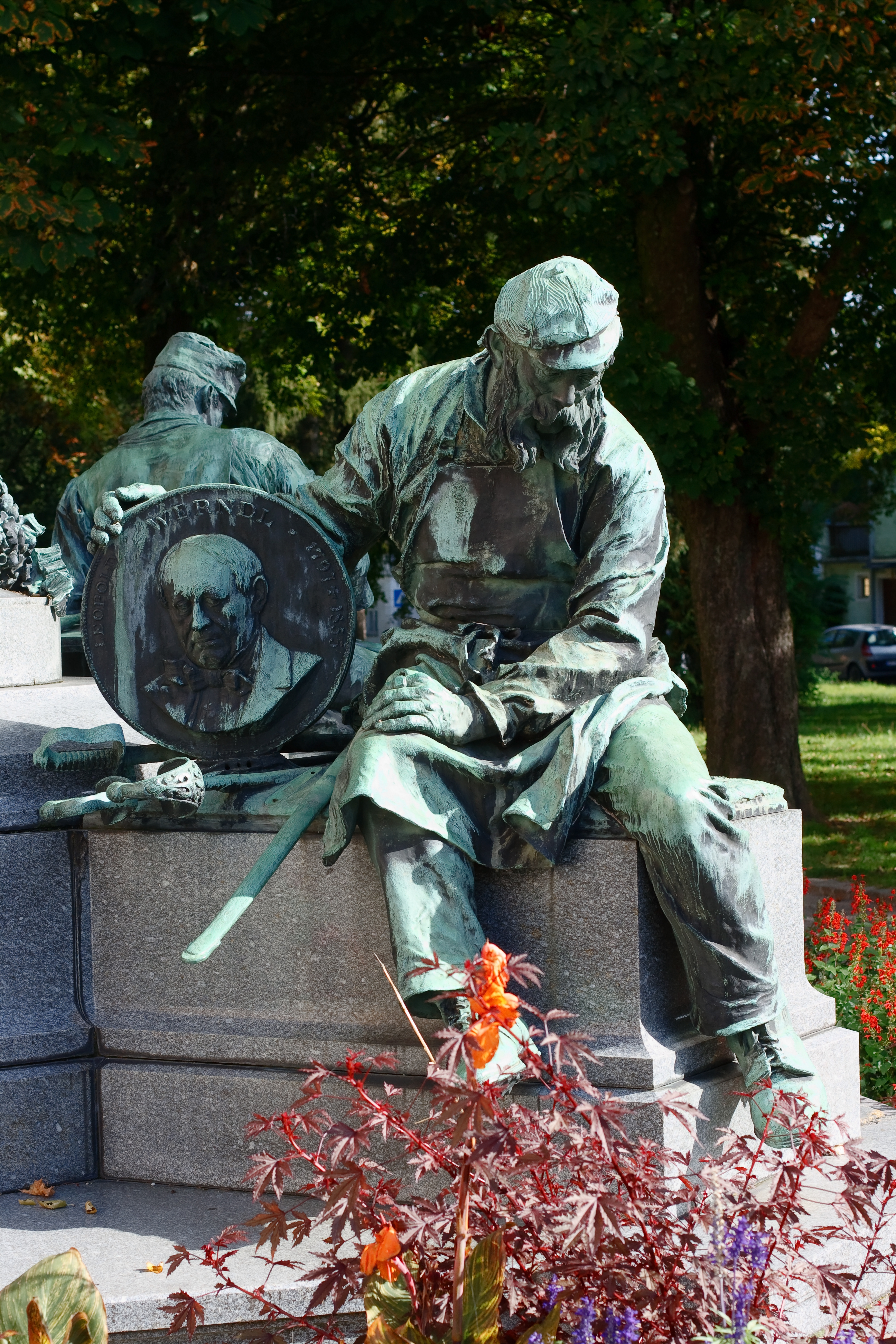 Eine der Figuren des Werndl-Denkmals an der Steyrer Promenade: Säbelmacher mit dem Porträt Leopold Werndls